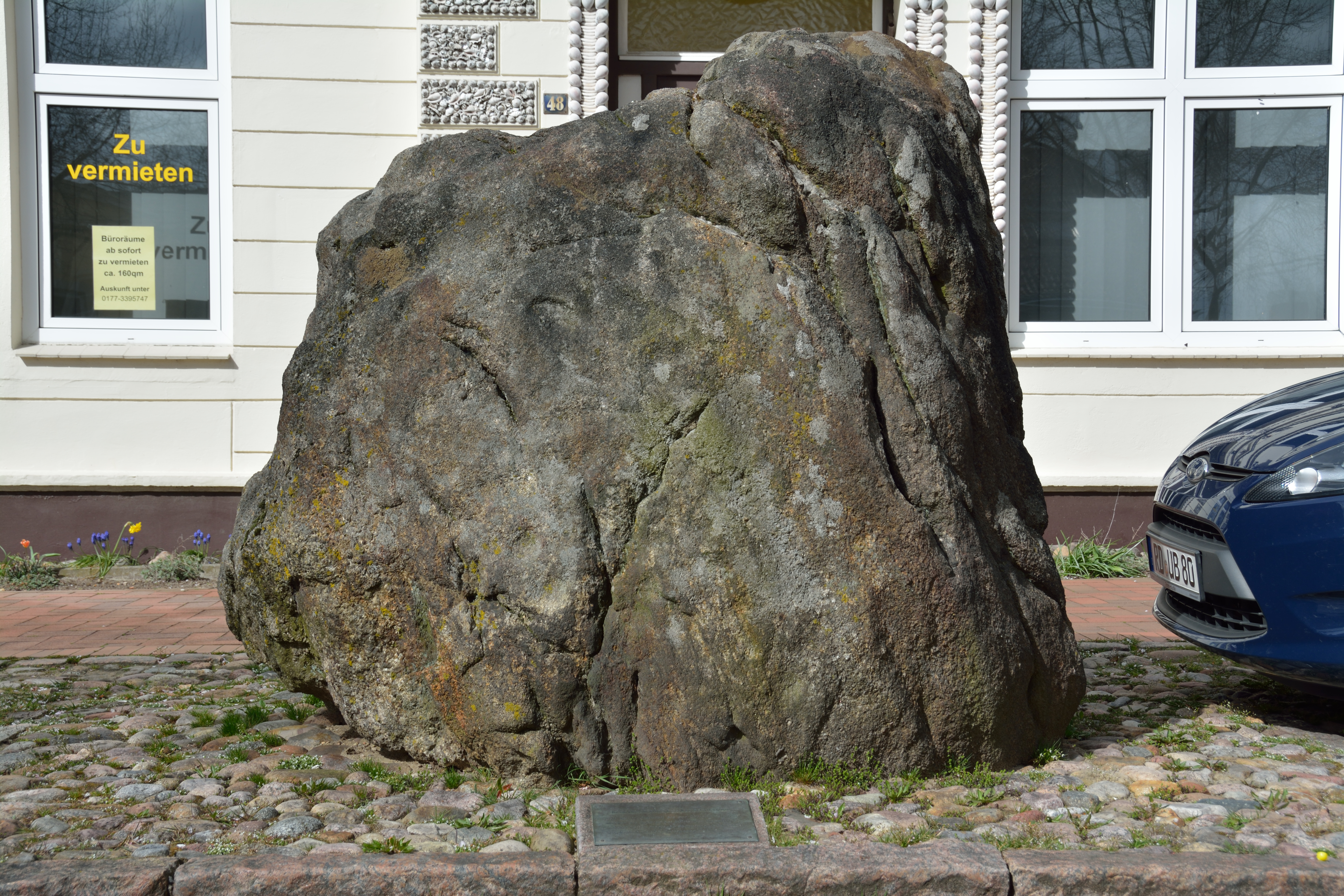 Naturdenkmal im Kreis Rendsburg-Eckernförde Opferstein, Hohenwestedt